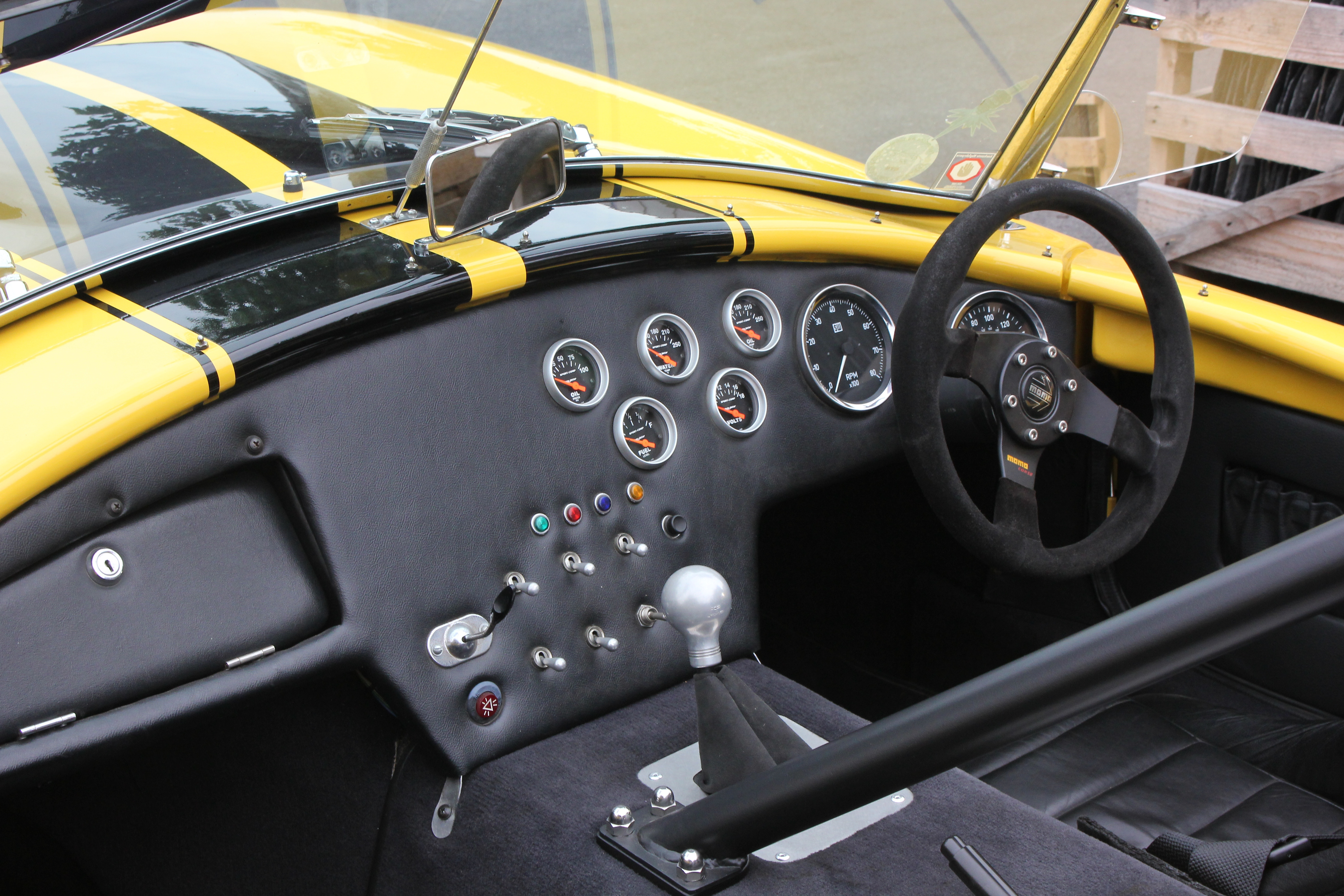 AC Cobra 427 Replica Magnum